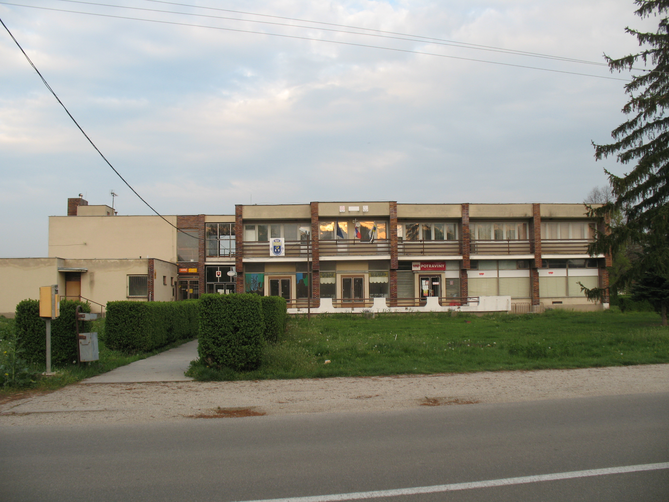 Vajkmártonfalva